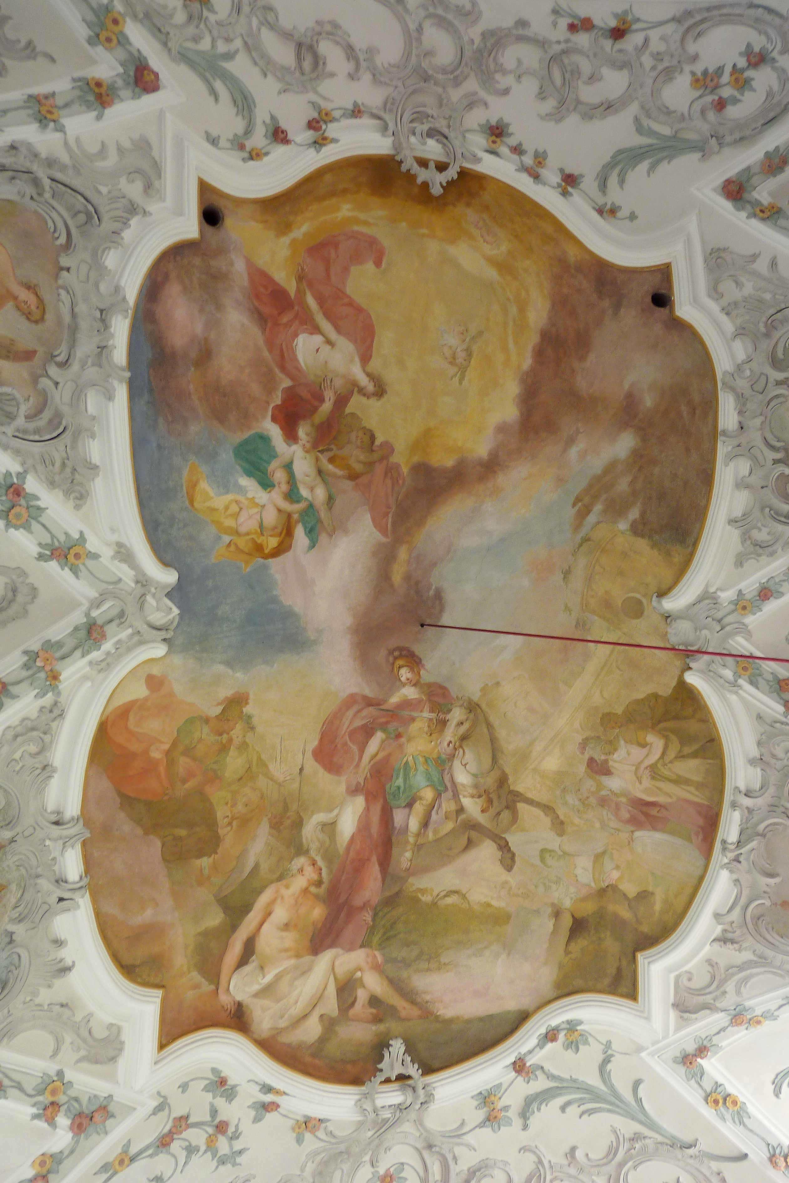 Katholische Pfarrkirche St. Martin in Horgau, einer Gemeinde im Landkreis Augsburg (Bayern), Deckenfresko des Chores von 1760/70, vermutlich von Joseph Christ (1731-1788), Darstellung: hl. Martin teilt seinen Mantel mit einem Bettler, darüber Christus